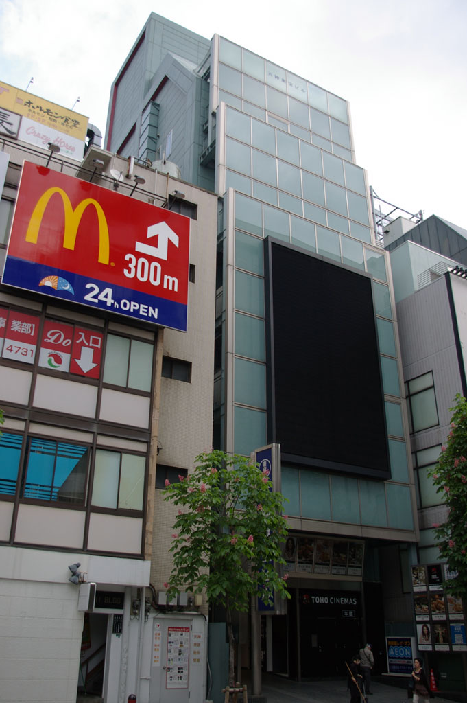 天神東宝ビル（TOHOシネマズ天神の他、飲食店等が入居）